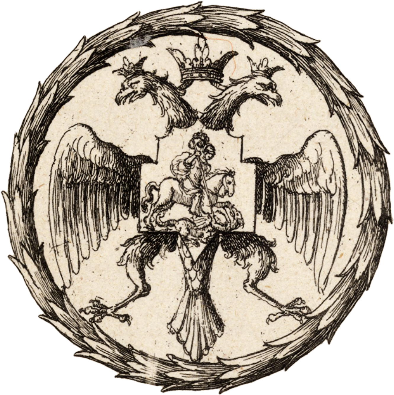 Гербовый орел с большой печати Бориса Годунова. До 1604 г.